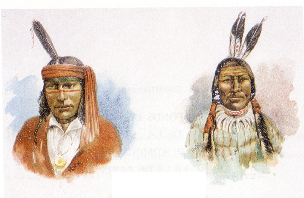 Indiens Ojibwa, 1885.